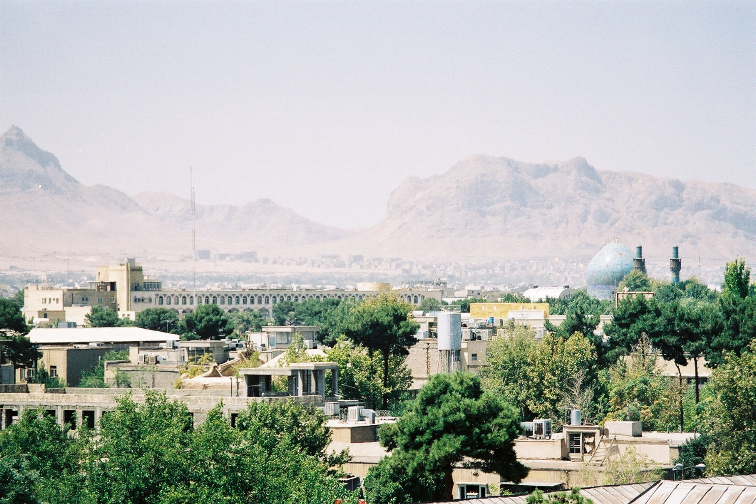 Une partie de la ville d'Ispahan vue depuis le toit du Palais d'`Ali Ghapu. Au premier plan le grand immeuble est l'Hotel Abbassi qui mérite une visite même si ce n'est pas pour y résider. Le Dôme est celui de la Madrasa de la mère du Chah nommée actuellement Madrasa Chahar Bâgh